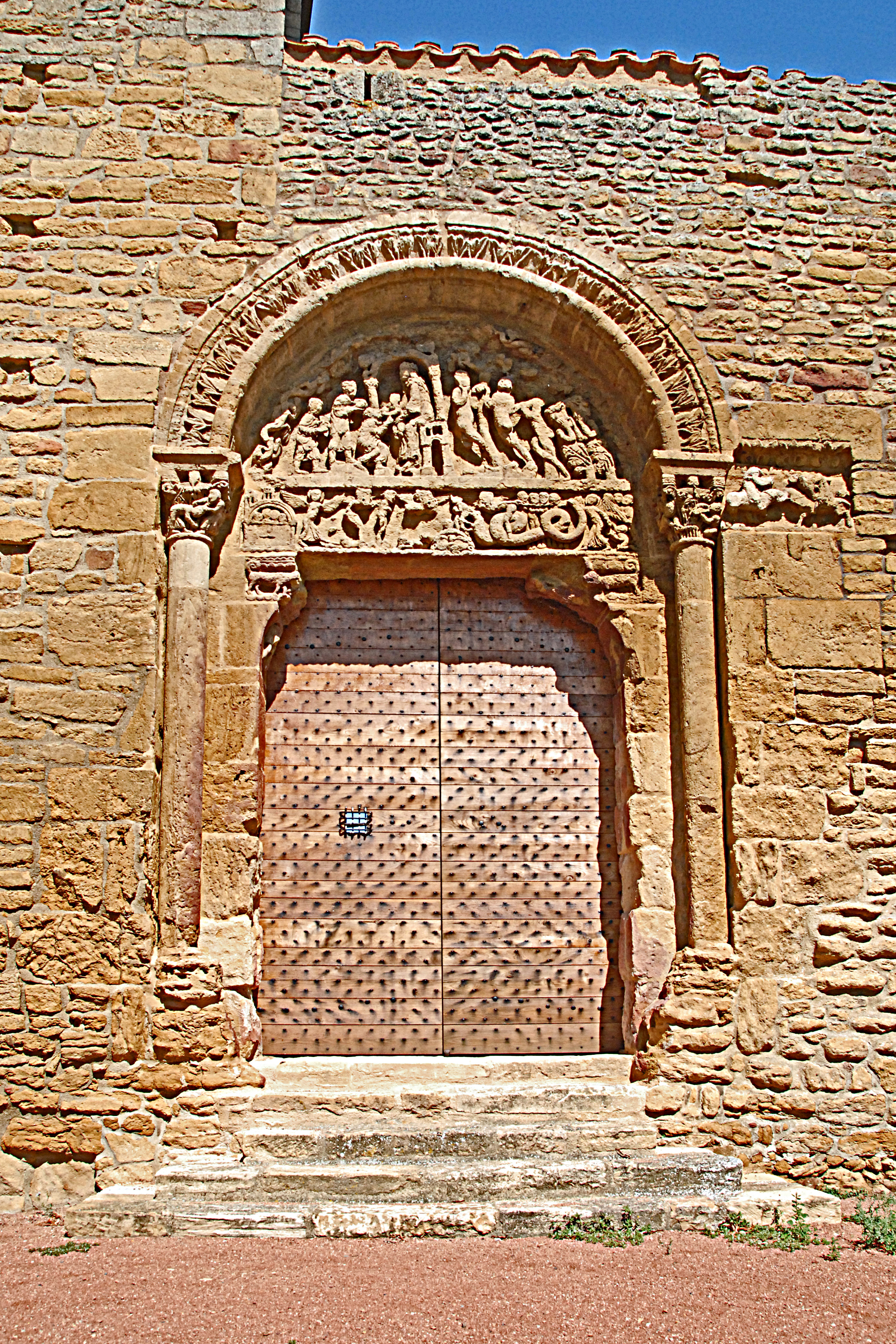 Südportal Kloster, von S